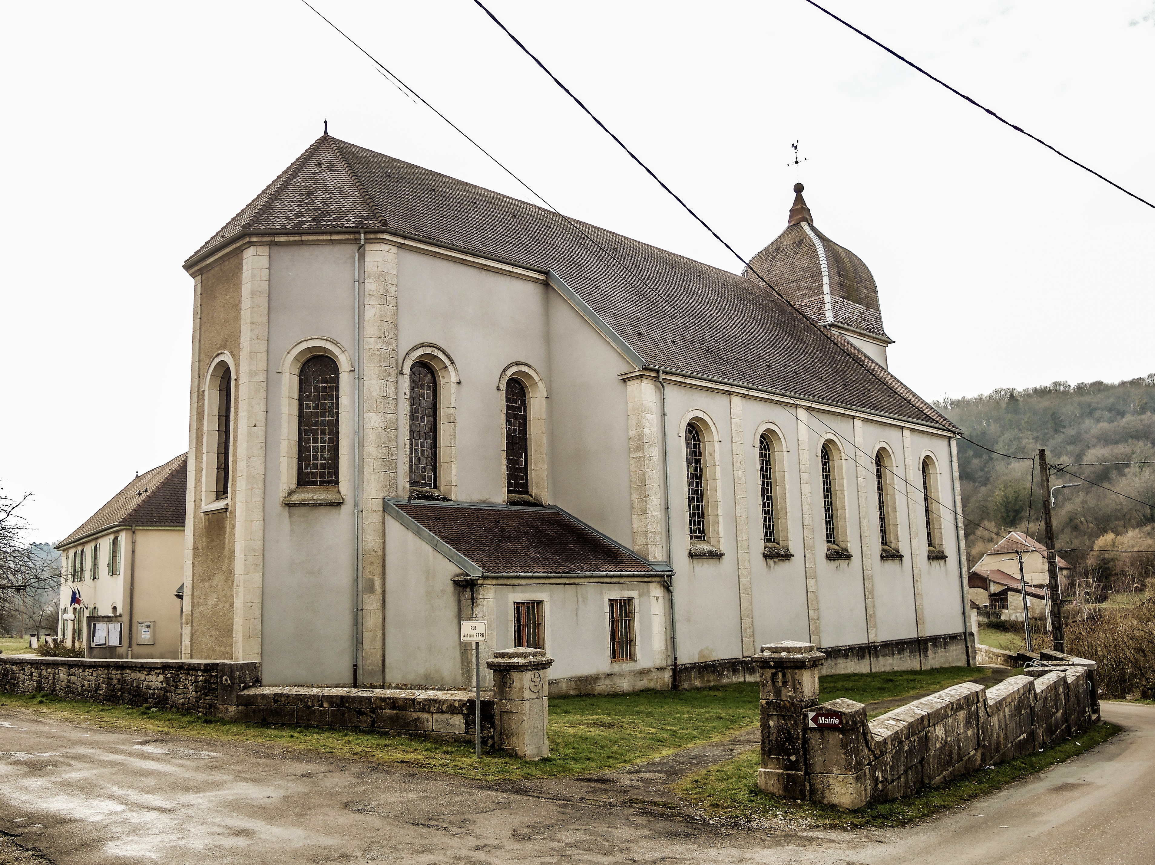 Eglise d'Onans.